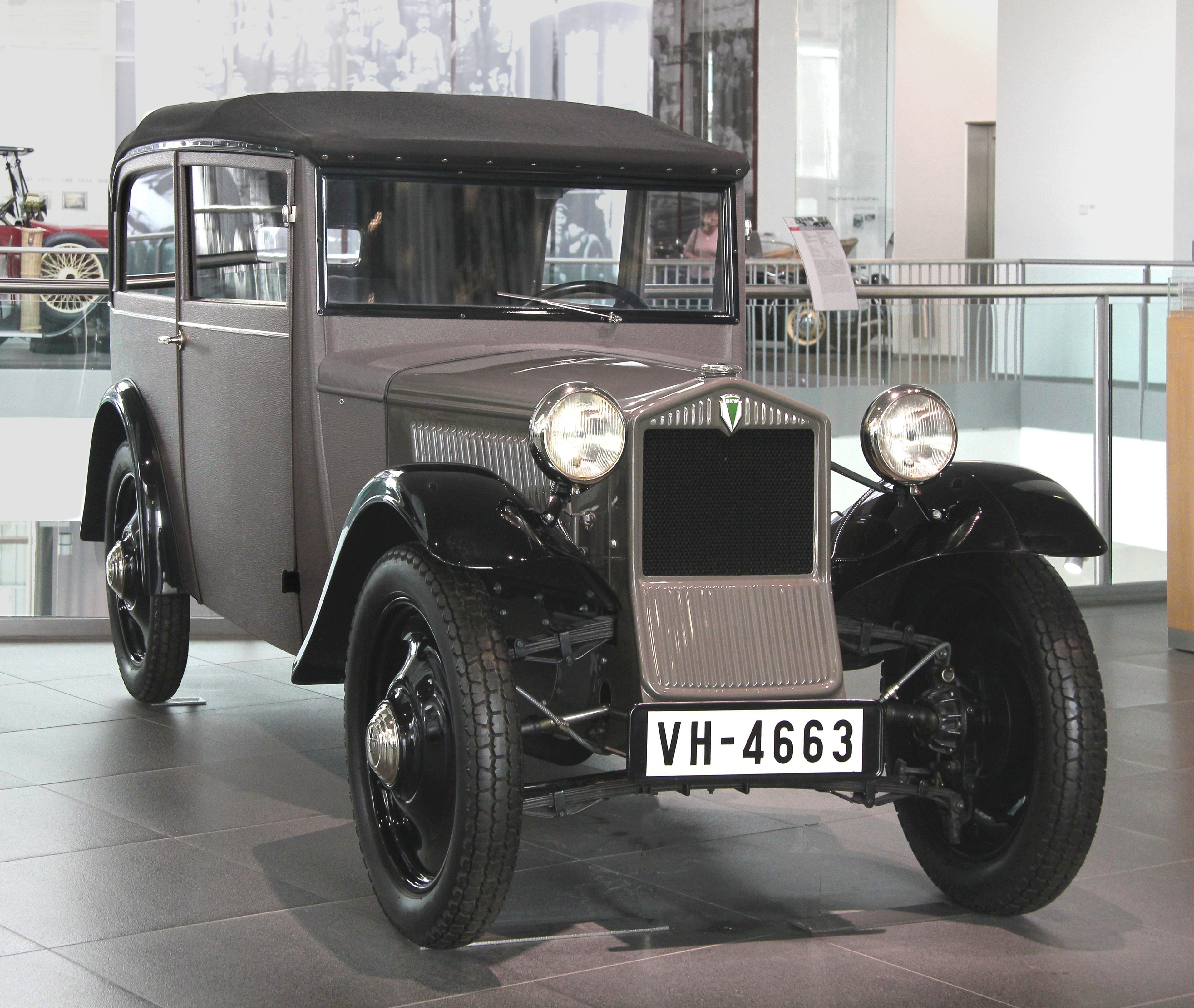 DKW F1 Limousine, kunstlederbezogene Holzkarosserie, Baujahr 1931, erster DKW mit Frontantrieb, im museum mobile in Ingolstadt. Das Auto hatte einen 2-Zylinder-Zweitaktmotor, 494 cm³, 15 PS.